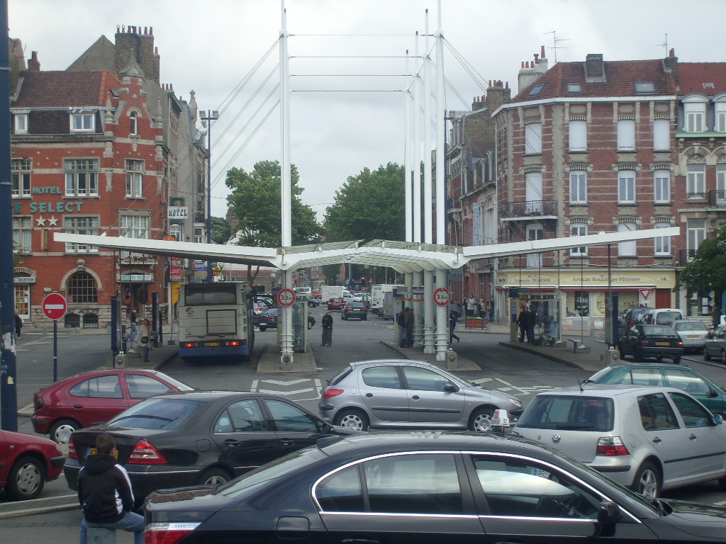 Gare Dk Bus de Dunkerque devant la gare.